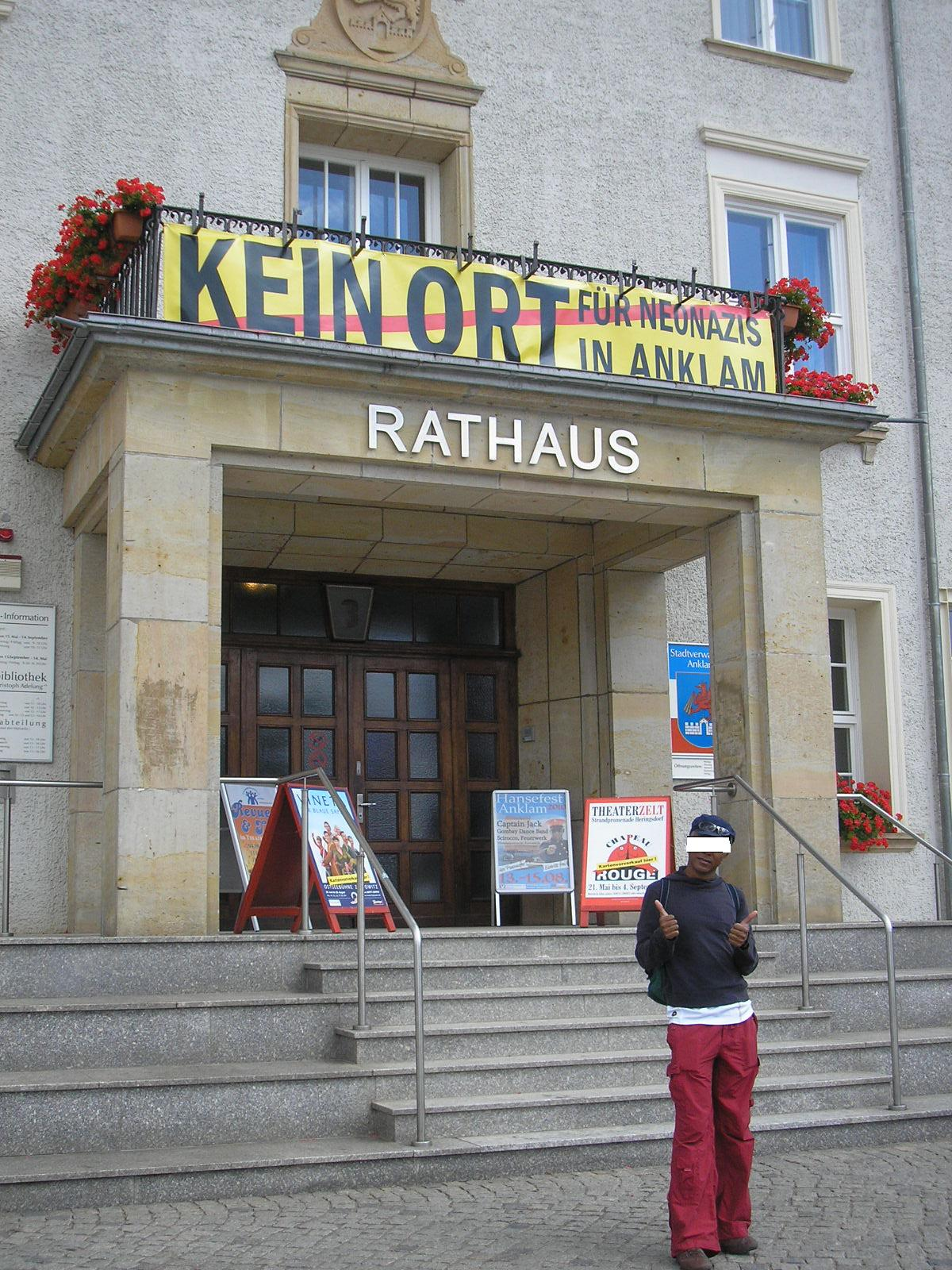 Protest gegen Neonazis. Banner am Rathaus von Anklam (Germany)